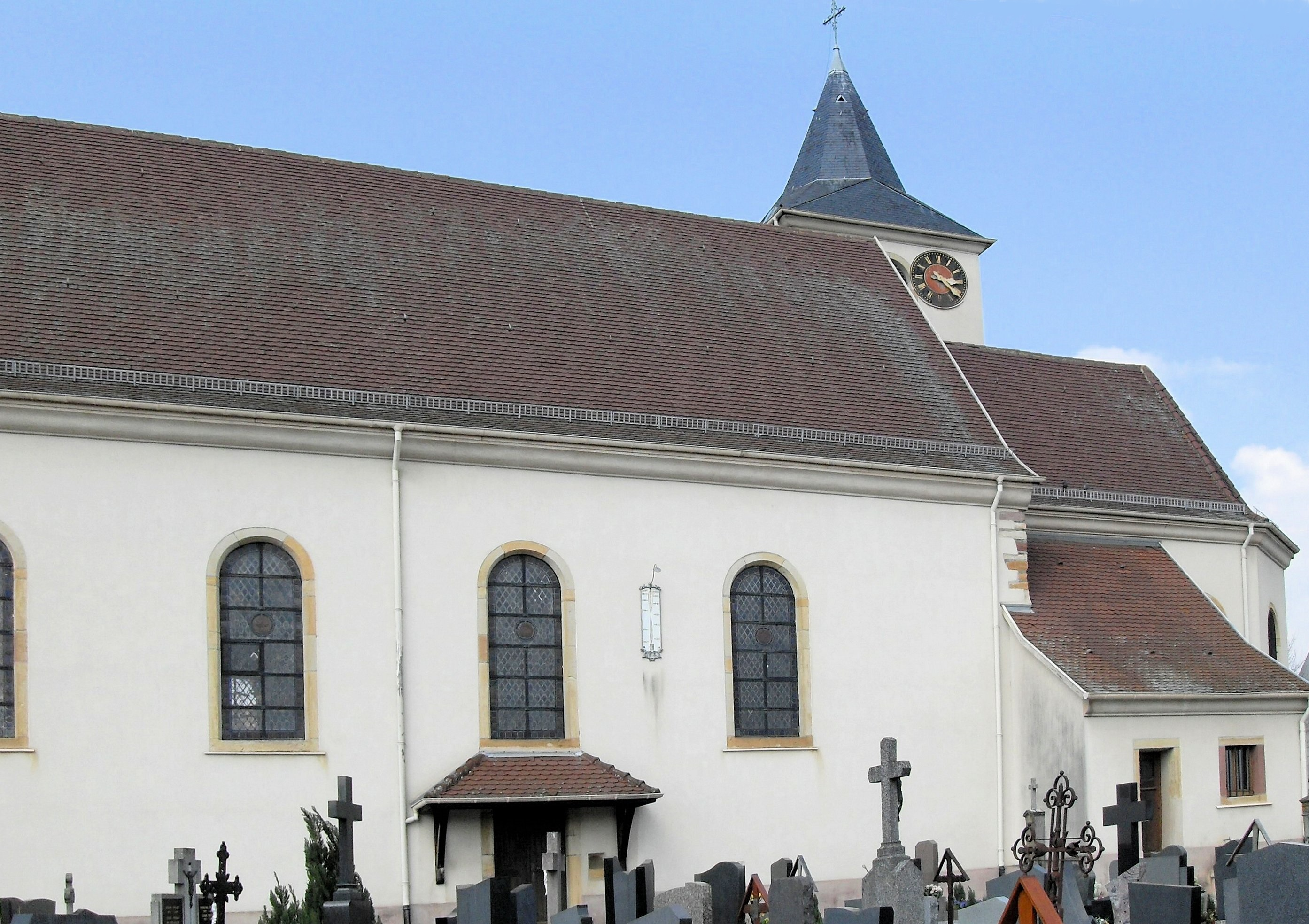 L'èglise Saint-Léger à Steinbrunn-le-Bas